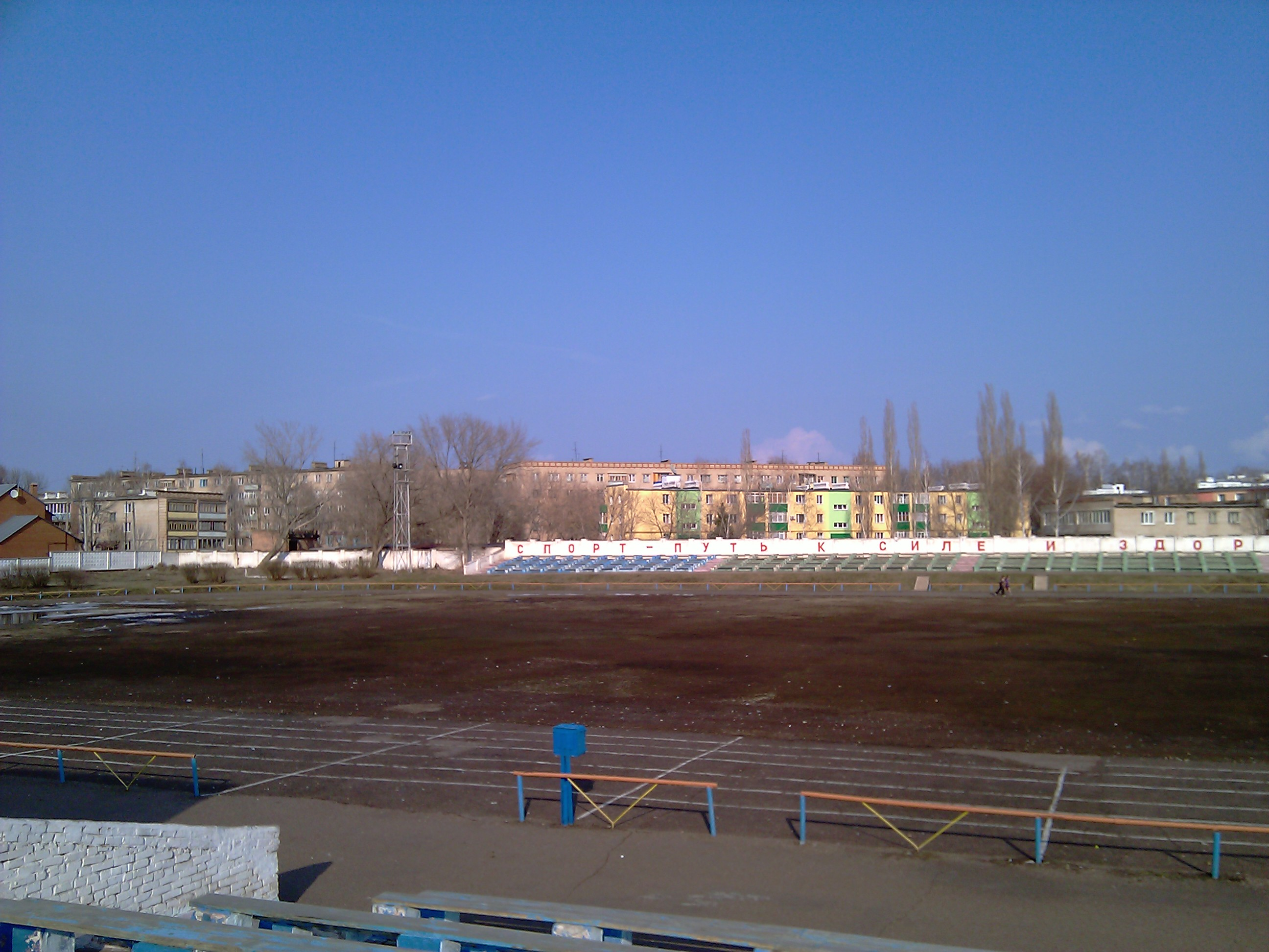 Стадион "Нефтяник" в городе Ишимбай